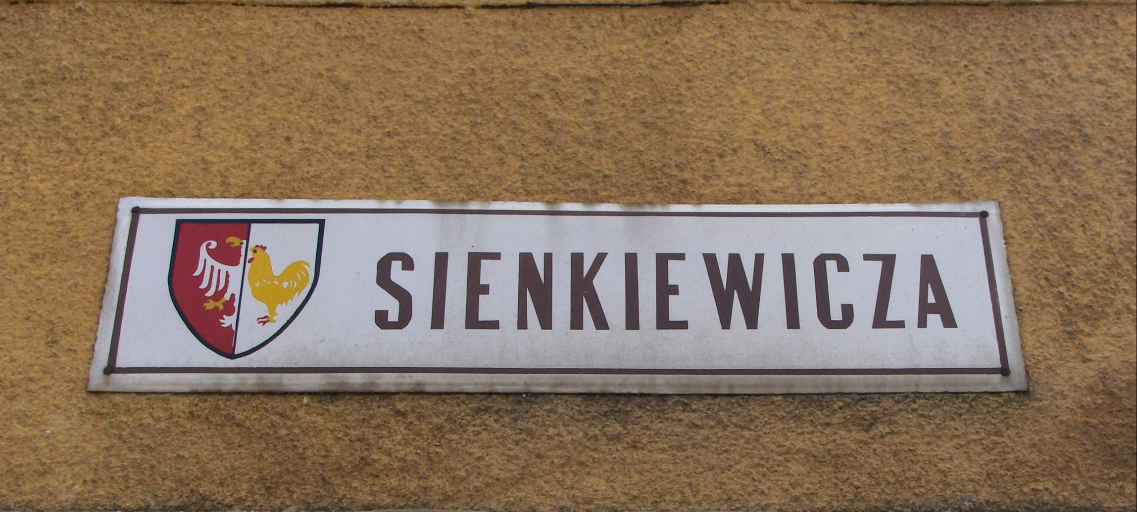 Ulica Sienkiewicza w Słubicach - tabliczka